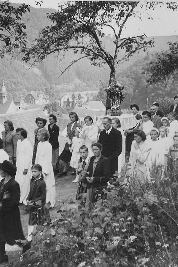 „Krautwischprozession“ (Patronatsfest Maria Himmelfahrt, Kirmes) in Auw an der Kyll, RHeinland-Pfalz, Deutschland ca. 1952